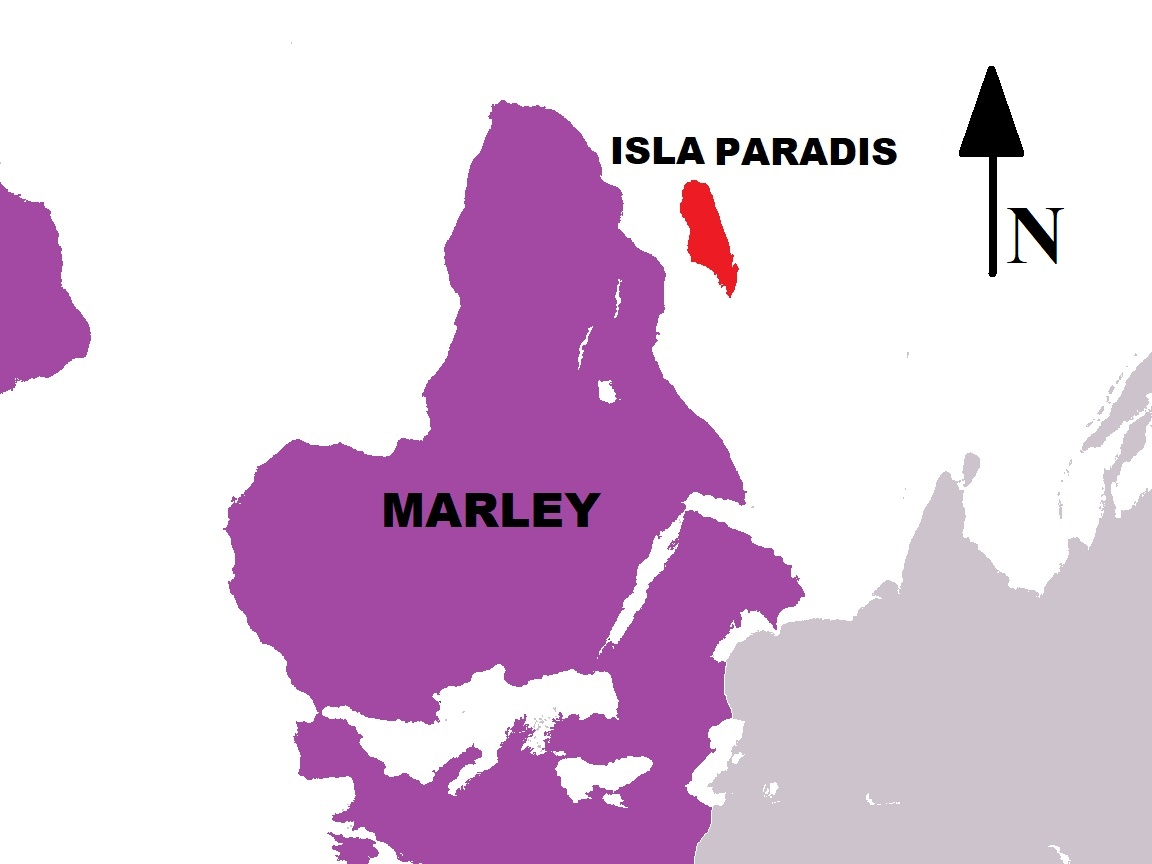 Mapa que representa al mundo ficticio del manga Shingeki No Kyojin, tal como lo concibió su creador Hayime Isayama.